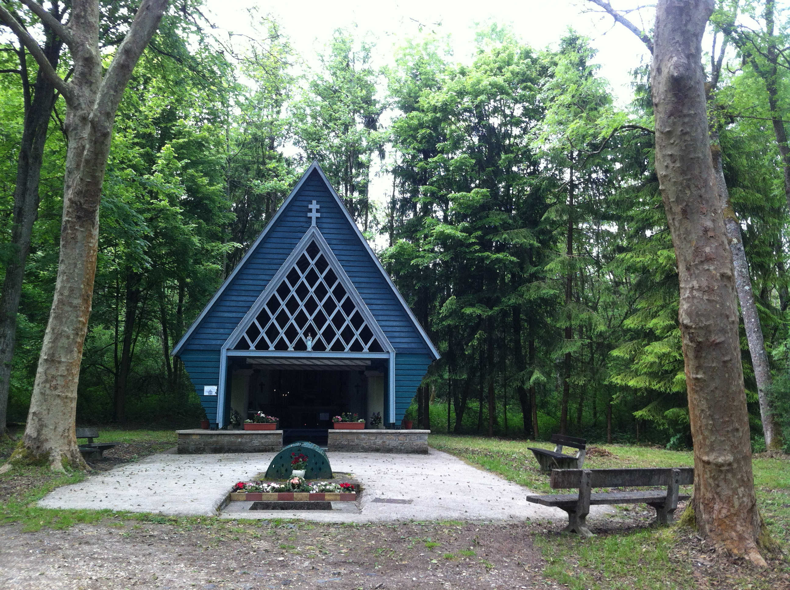 Chapelle Notre Dame de la Bonne Fontaine à Domjevin Chœur de style néogothique (1851 - Vautrin) Nef reconstruite en 1952 par Legrand